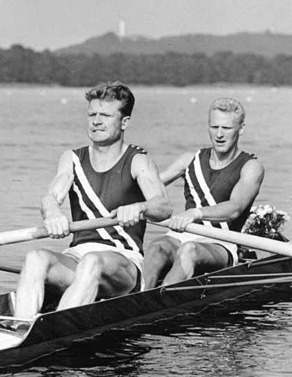 Günter Bergau, Peter Gorny Zentralbild 9.8.1964 Bergau-Gorny (DDR) Ruder-Europameister 1964 im Zweier mit Steuermann Zu einem großartigem Erfolg kam der Rostocker Zweier mit Steuermann in der Besetzung Günter Bergau, Peter Gorny und Steuermann Dieter Danielowsky, die sich bei den Ruder-Europameisterschaften 1964 in Amsterdam den Titel vor der UdSSR und Polen holten. (Archivbild)